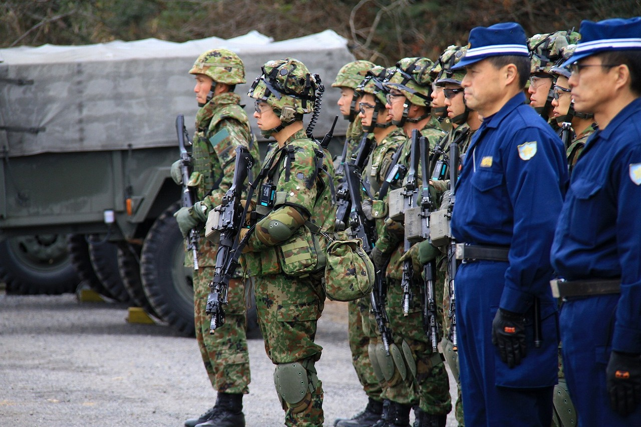 陸上自衛隊第１３旅団 警察との共同訓練